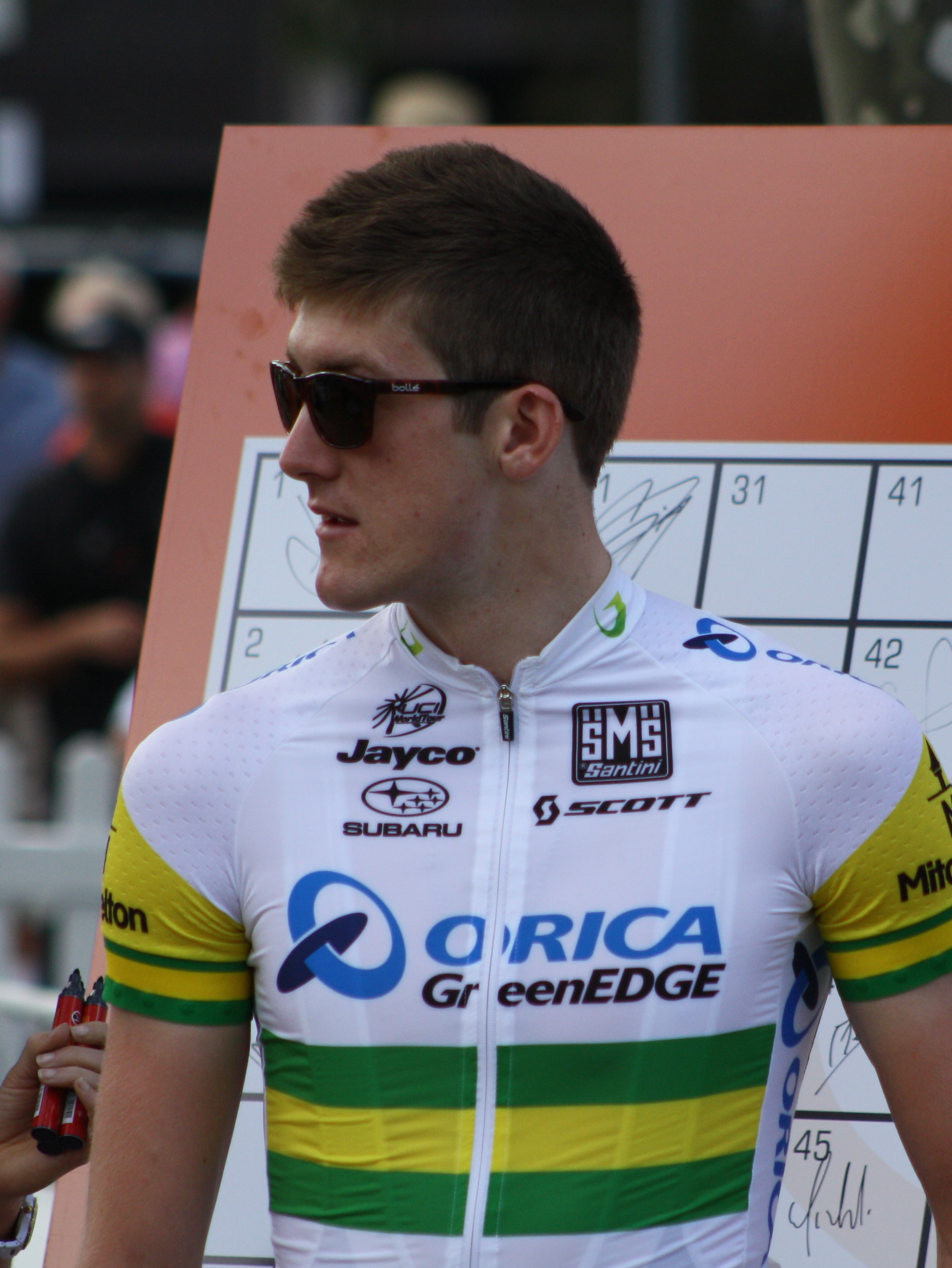 Durbo